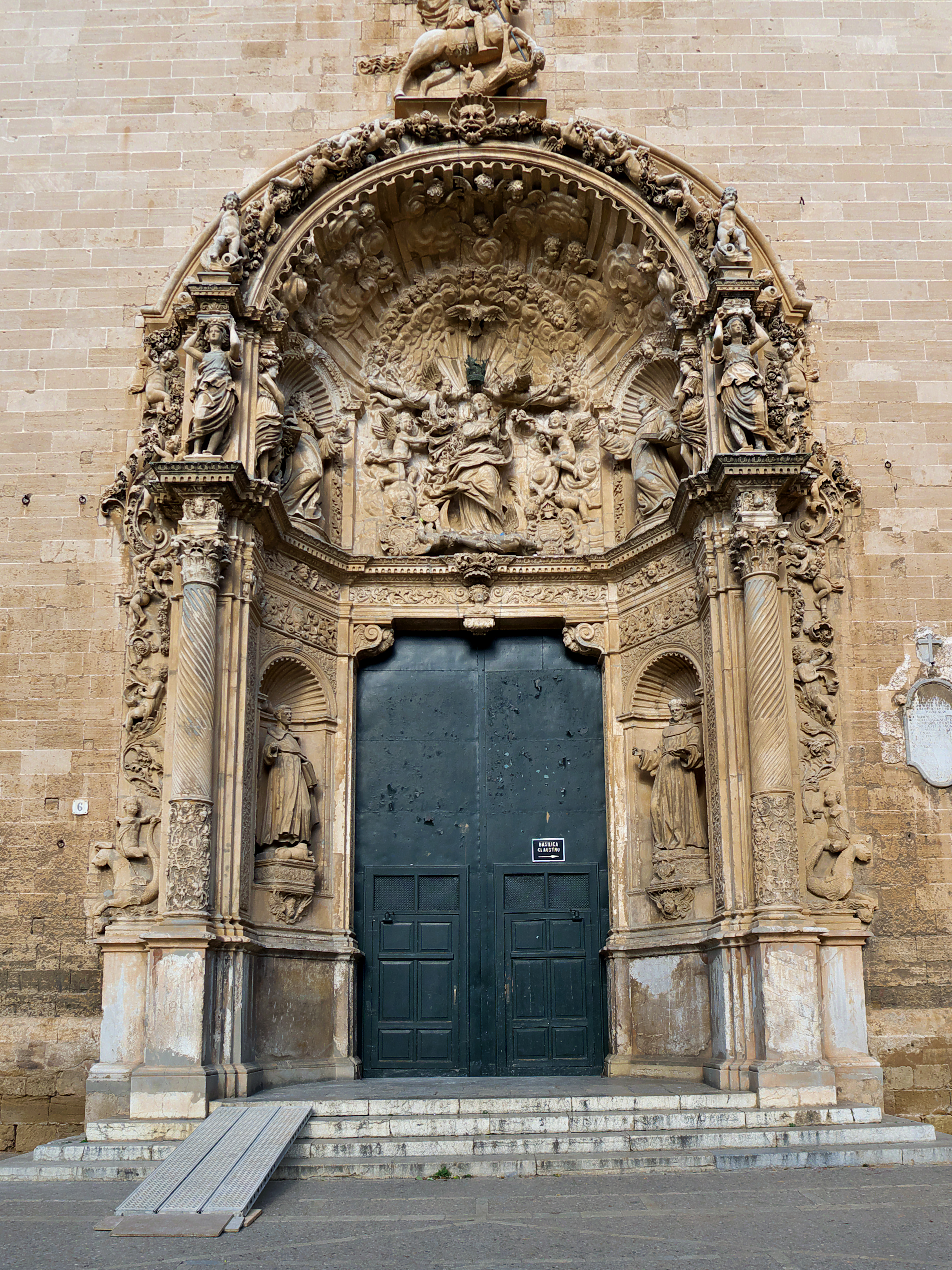 Portada principal (1680-1700). Esta iglesia sufrió los daños de un importante rayo en 1580. En el año 1621 se plantea la construcción de una nueva fachada. Pedro Horrach y Francisco de Herrera son los autores de la misma.